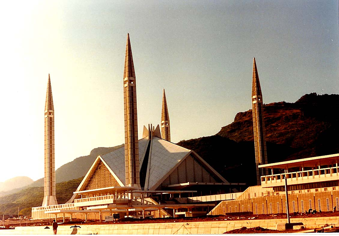 Faisalmoschee zu Islamabad Source: Eege Foto (ëm 1987) vum user ernmuhl